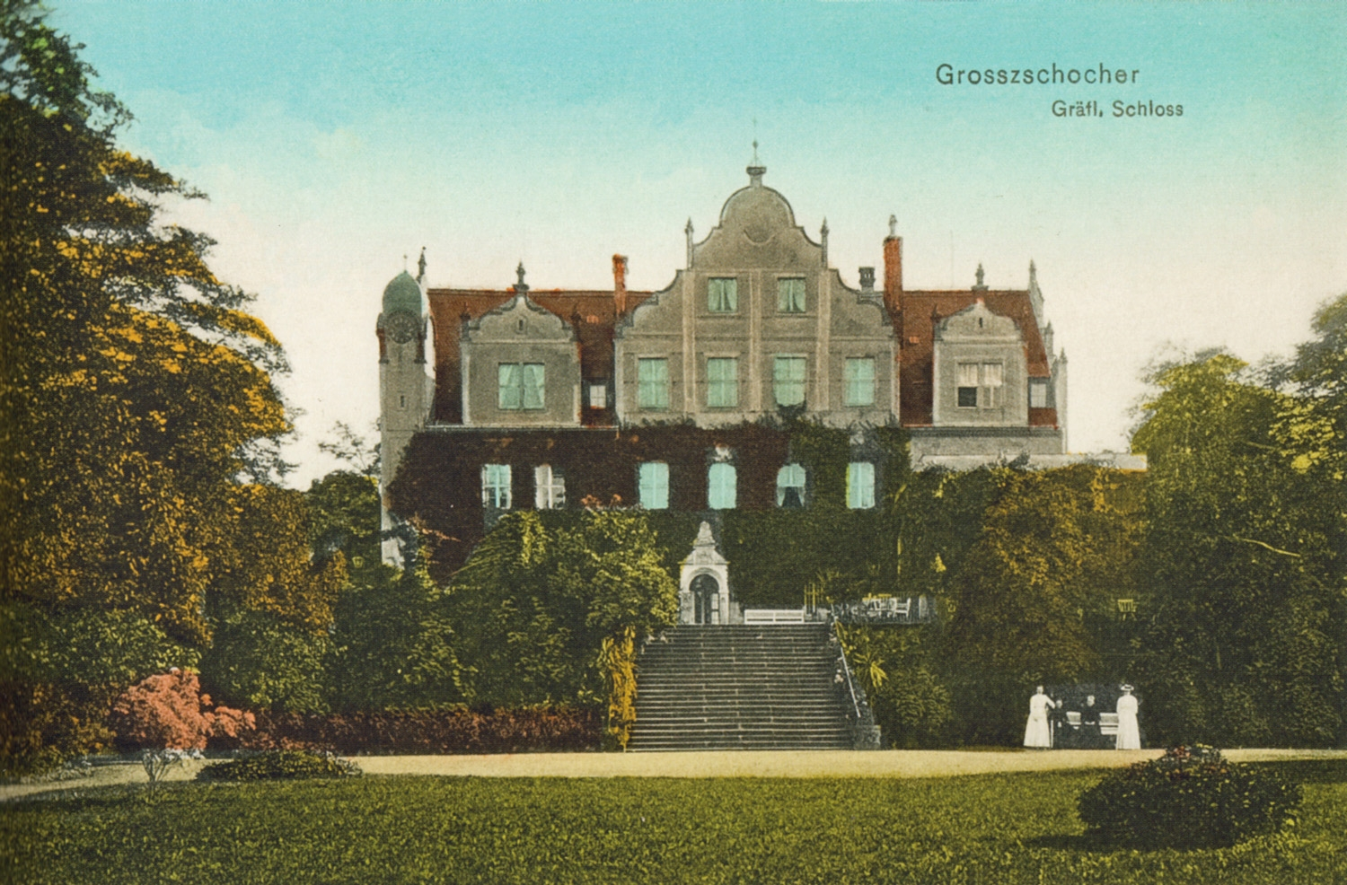 Das Schloss Großzschocher, Parkseite, um 1910